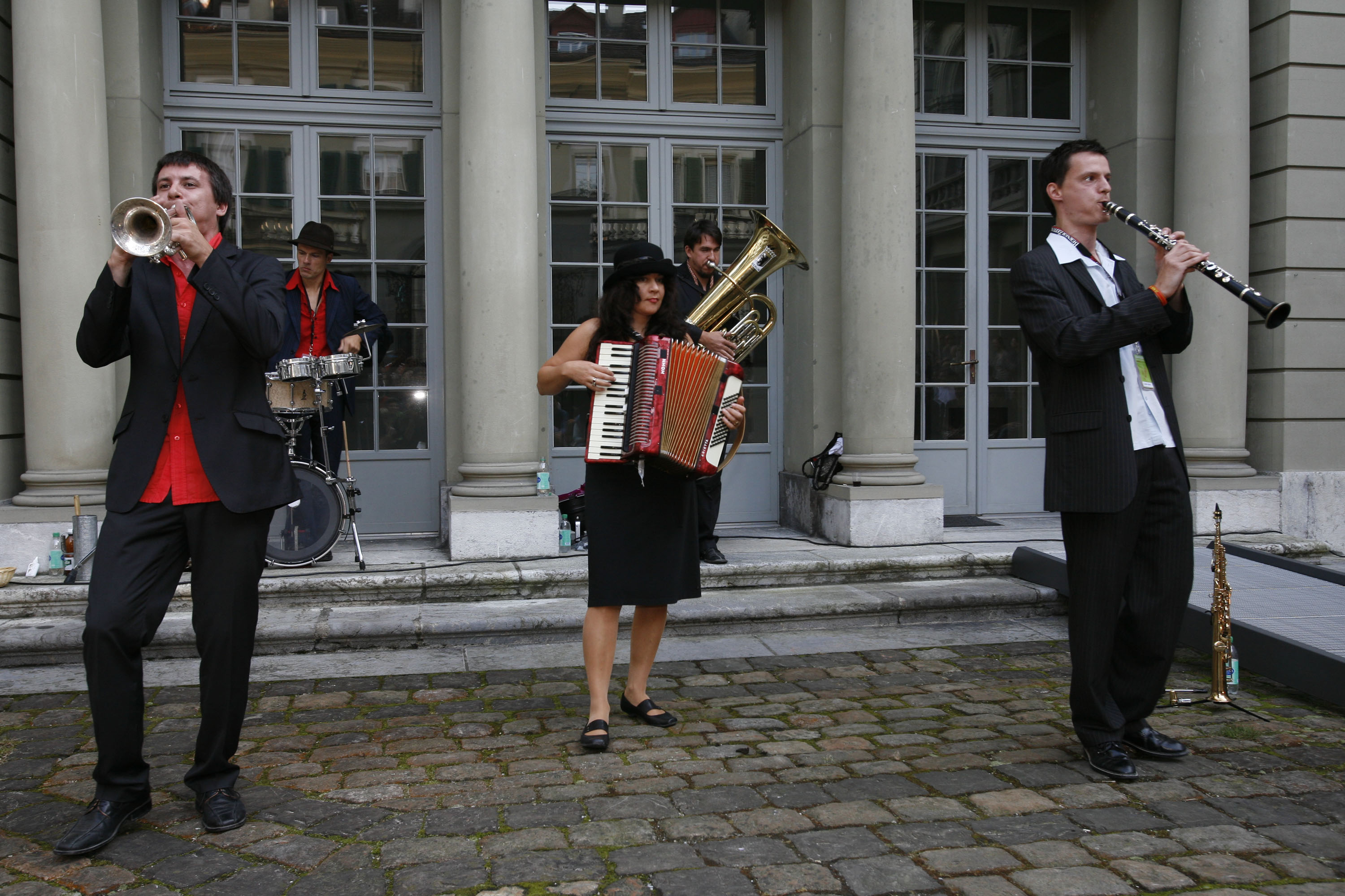 deutsche Band Di Grine Kuzine